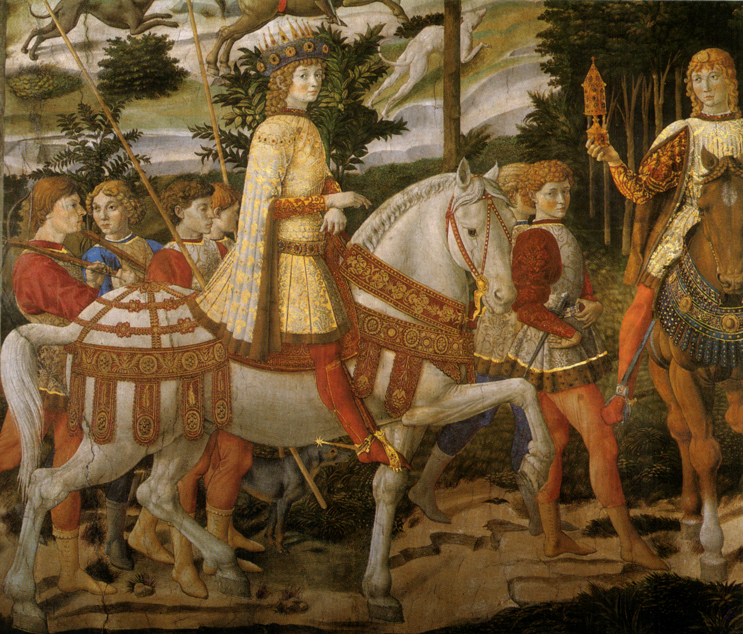 Lorenzo de' Medici as a teenager. Fresco by Benozzo Gozzoli, in the "Cappella dei Magi", at Palazzo Medici Riccardi in Florence, Italy.